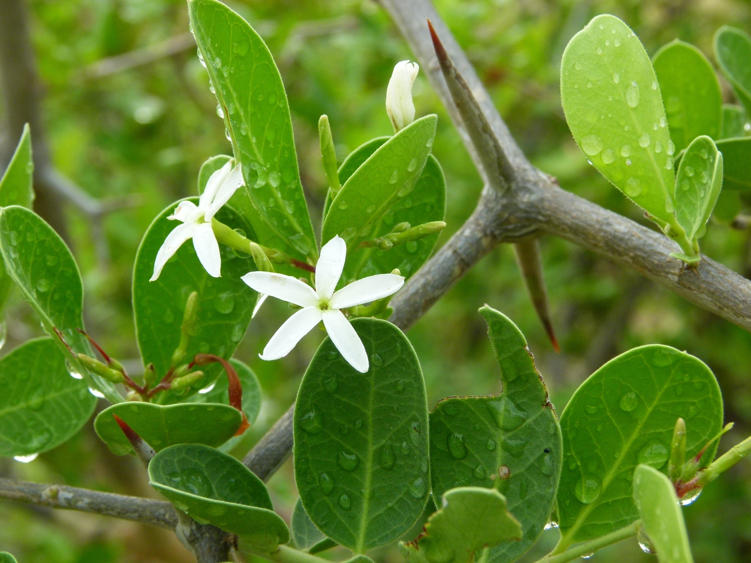 Carissa spinarum, Maidenahalli, Tumkur